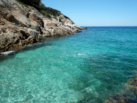 Acqua limpida a Montecristo (autore: Ambrogio Volpi)